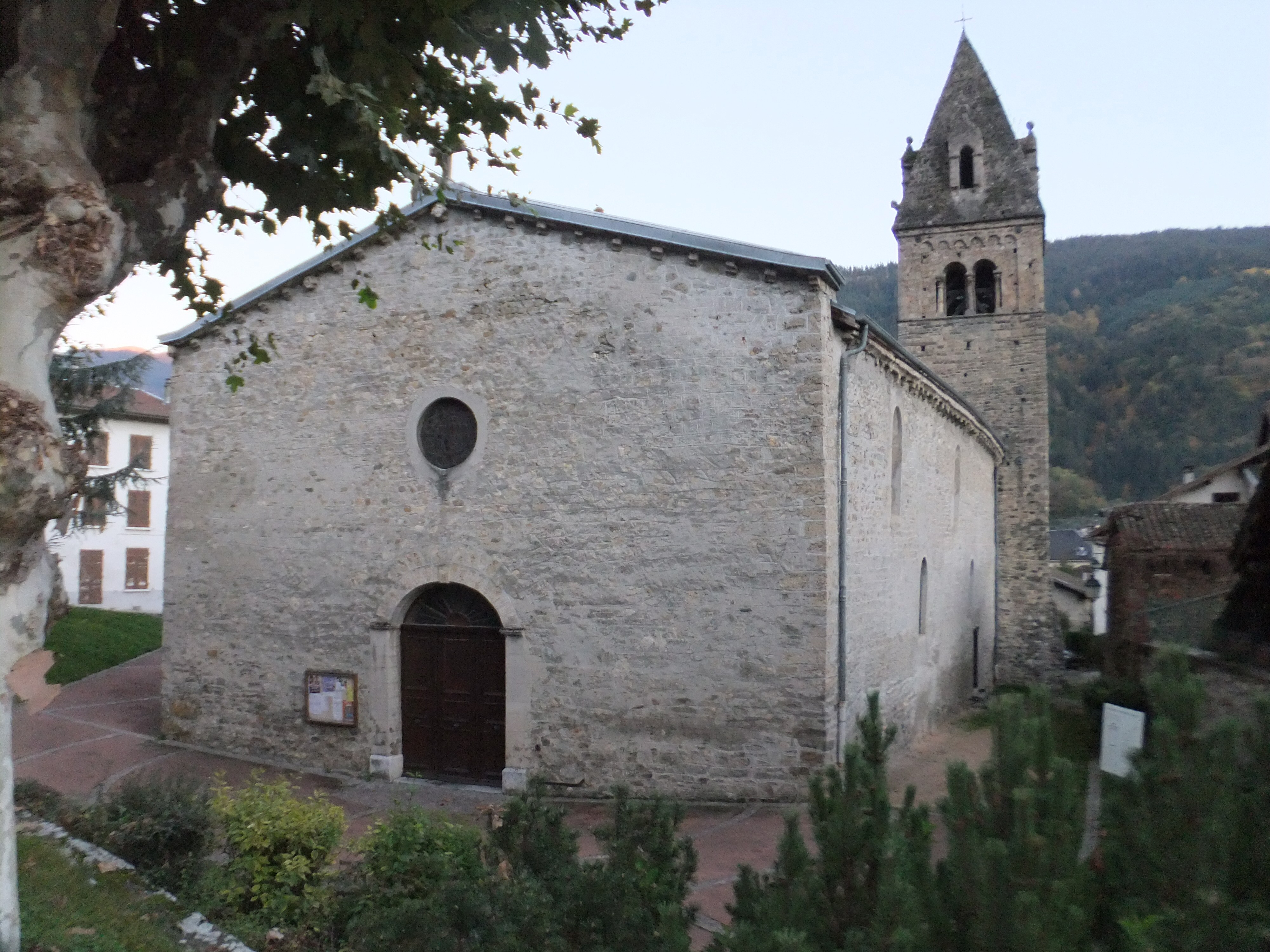 Vue générale de l'église de Saint-Pierre d'Allevard, coté façade, avant les rénovations de 2011. La porte d'entrée donne sur un parvis dallé en arc de cercle.